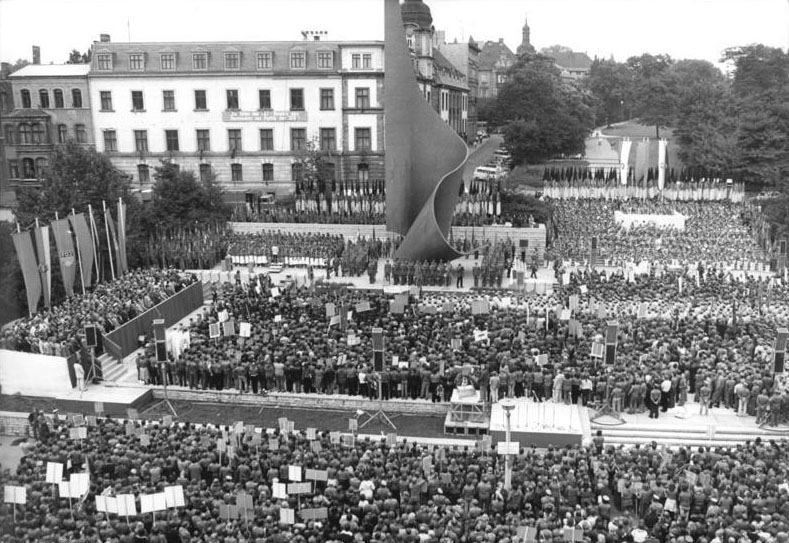 ADN-ZB-Lehmann-22.8.1981-frs-Halle: Friedensmanifestation. Mit einer Friedensmanifestation bekundeten vor dem Fahnenmonument in der Bezirksstadt Tausende Mitglieder der FDJ ihre Entschlossenheit, alle Kräfte für die weitere Stärkung des Sozialismus und den zuverlässigen Schutz der Arbeiter- und Bauernmacht einzusetzen. Übersicht während der Ansprache von Egon Krenz.